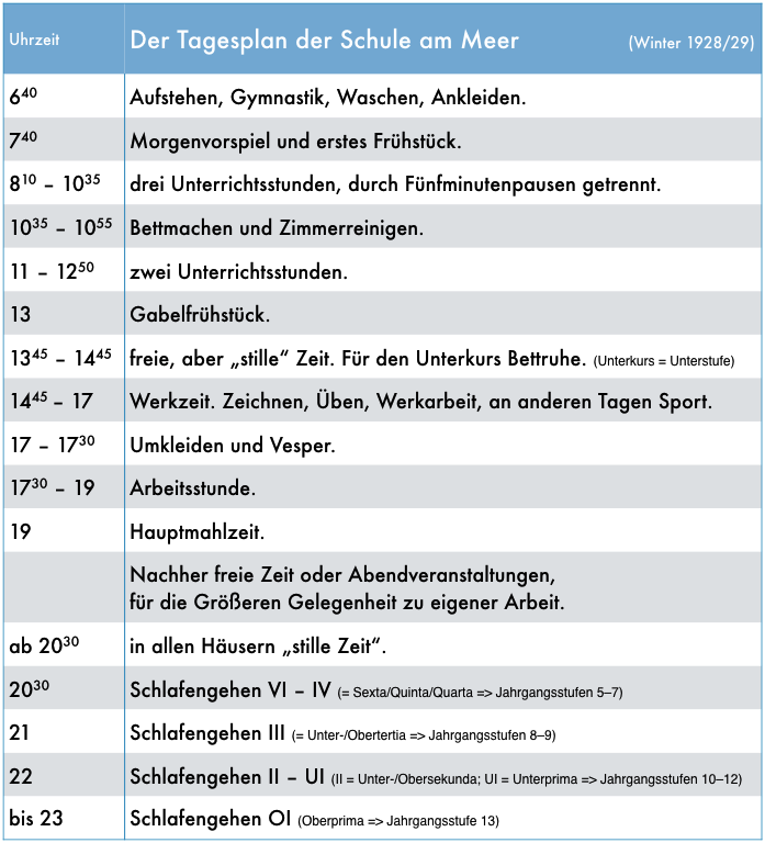 Tagesplan der Schule am Meer im Loog auf der Nordseeinsel Juist in Ostfriesland im Schuljahr 1928/29.